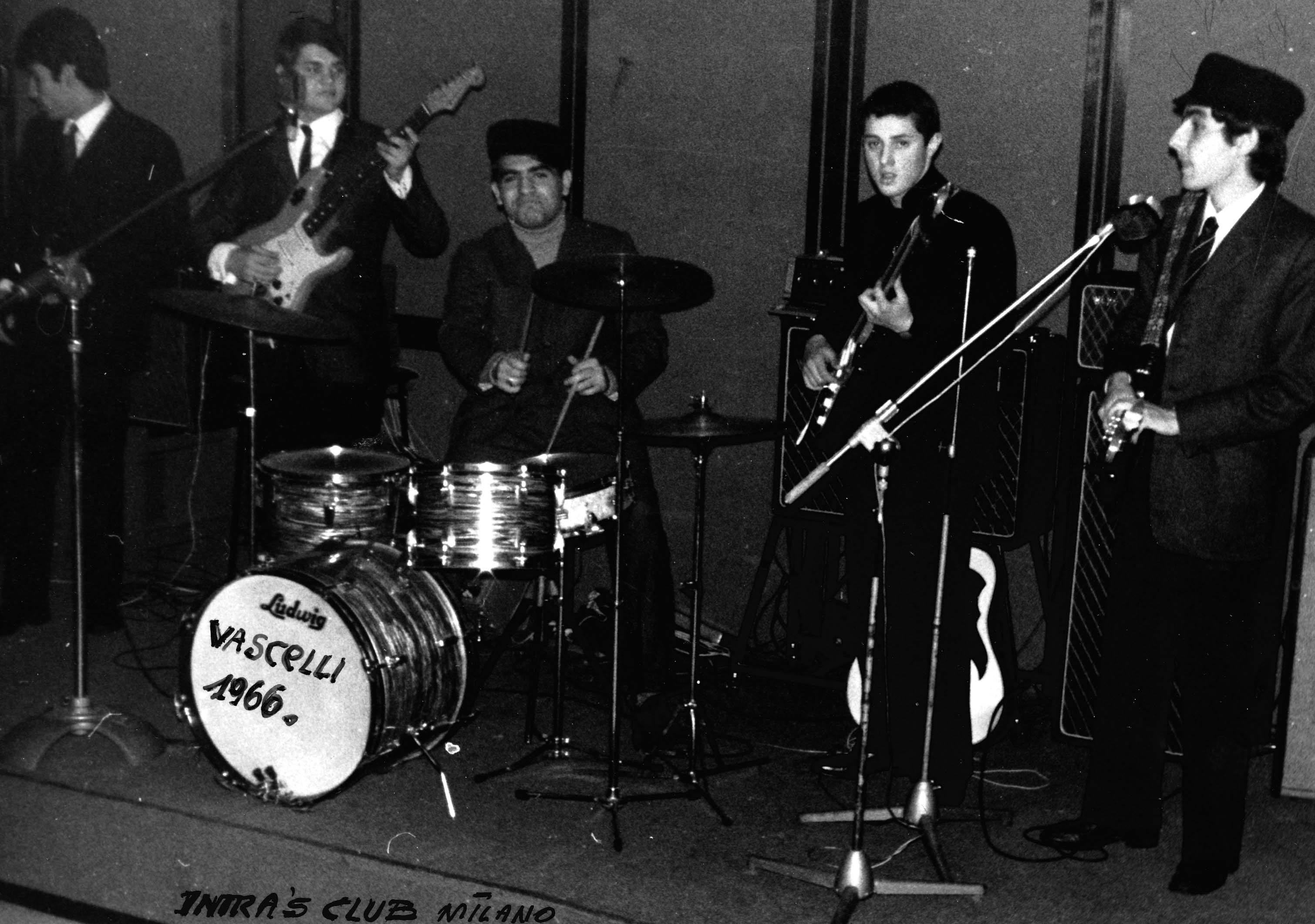 I VASCELLI italian band (1965)